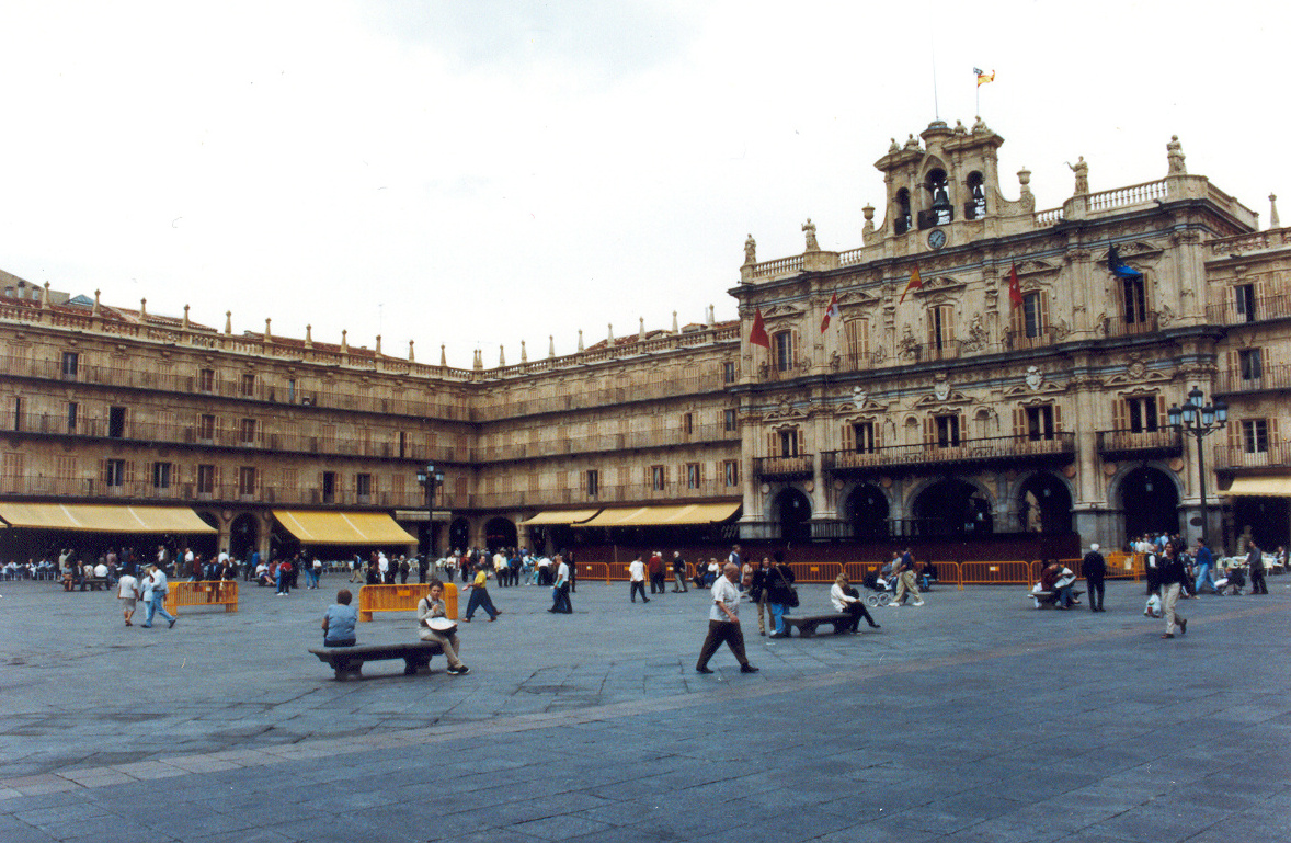 Plaza Mayor, Salamanca